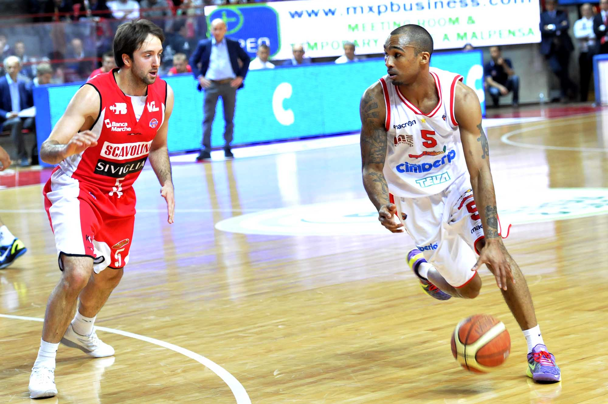 Daniele Cavaliero e Phil Goss